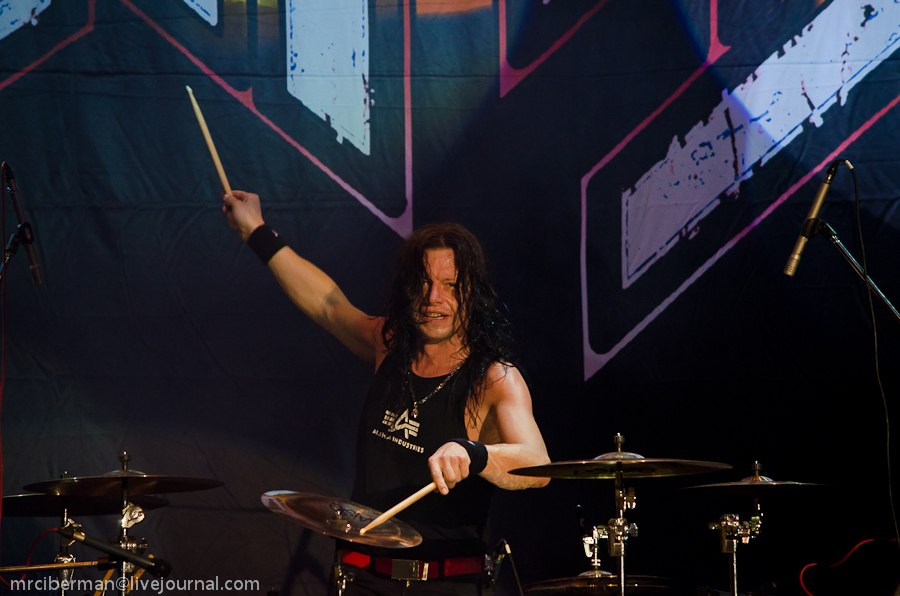 Концерт Арии в Калуге 04/10/2012.